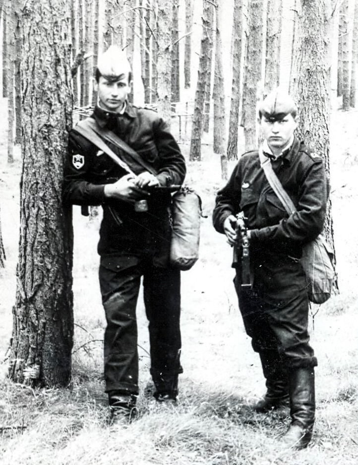 Soldaten der Gruppe der Sowjetischen Streitkräfte in Deutschland in Perleberg in den frühen 1980er-Jahren.